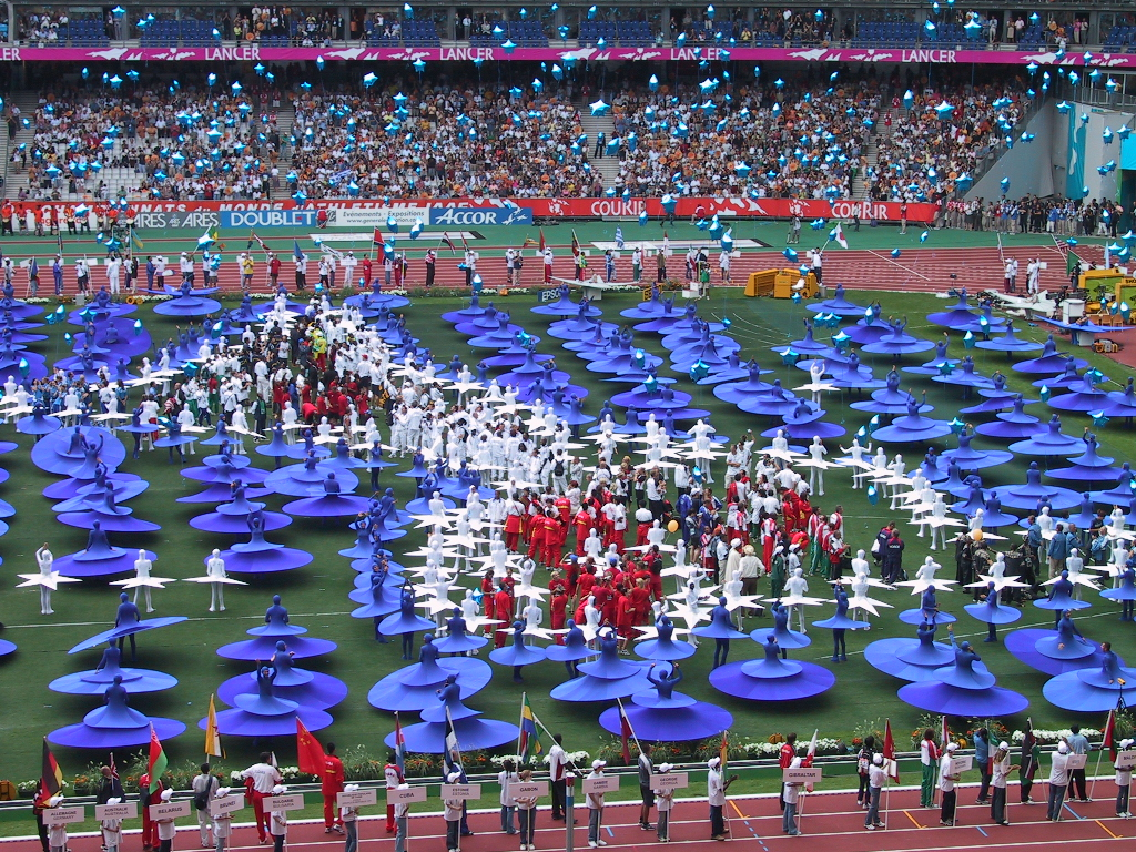 Description: Championnats du monde d'athlétisme 2003 - Cérémonie d'ouverture Lieu: Paris Auteur